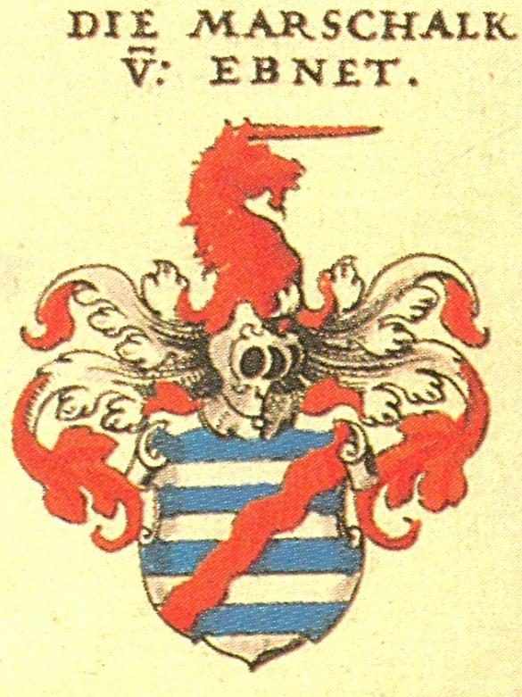 Wappen der Fränkischen Adelsfamilie Marschalk von Ebnet